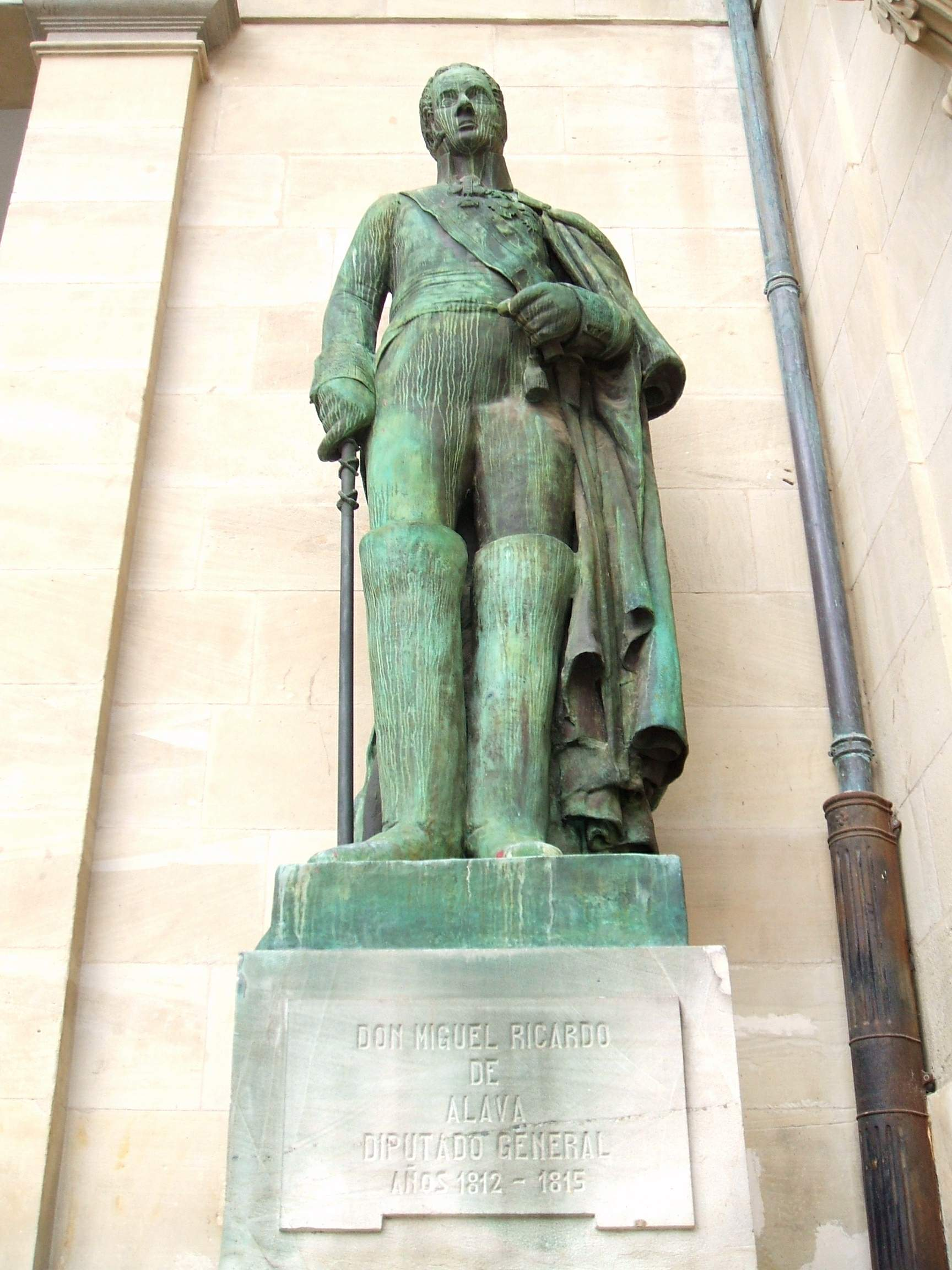 Diputación Foral de Álava, en Vitoria-Gasteiz. Estatua de Miguel Ricardo de Álava, diputado general en 1812-1815